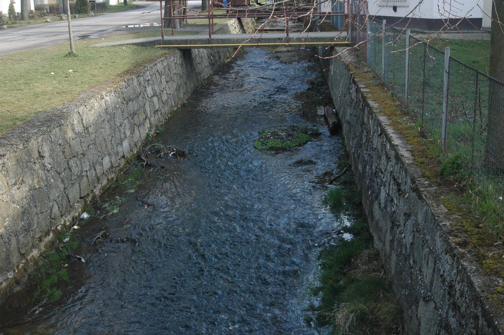 Sološnický potok, spring